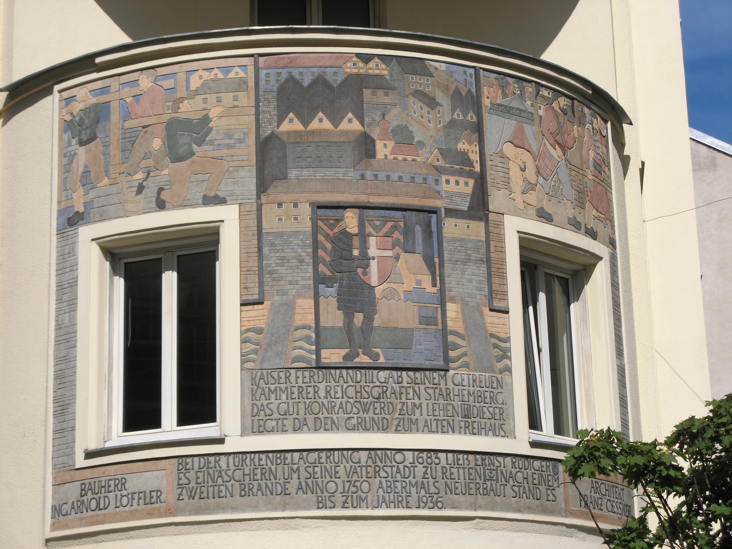 Sgraffito zur Erinnerung an das Freihaus, Operngasse 25, Wien-Wieden